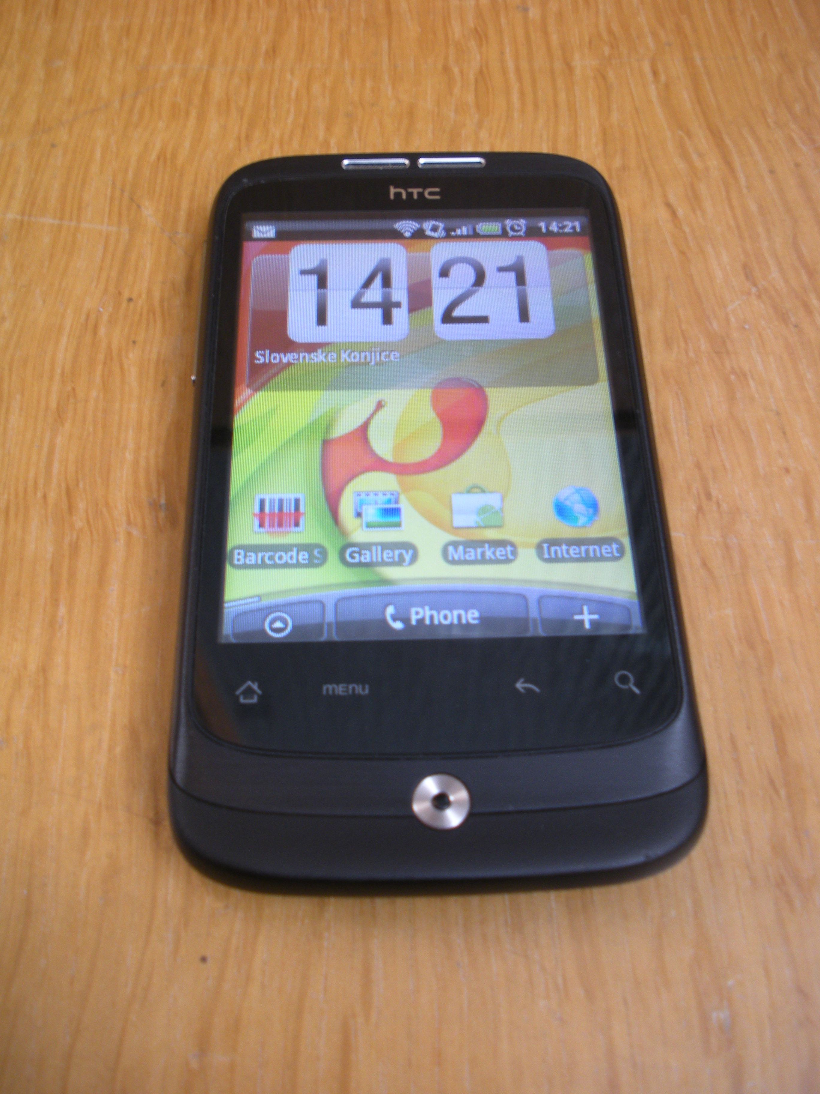 Htc Wildfire